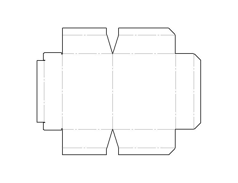 Die Abbildung zeigt eine Blechabwicklung.